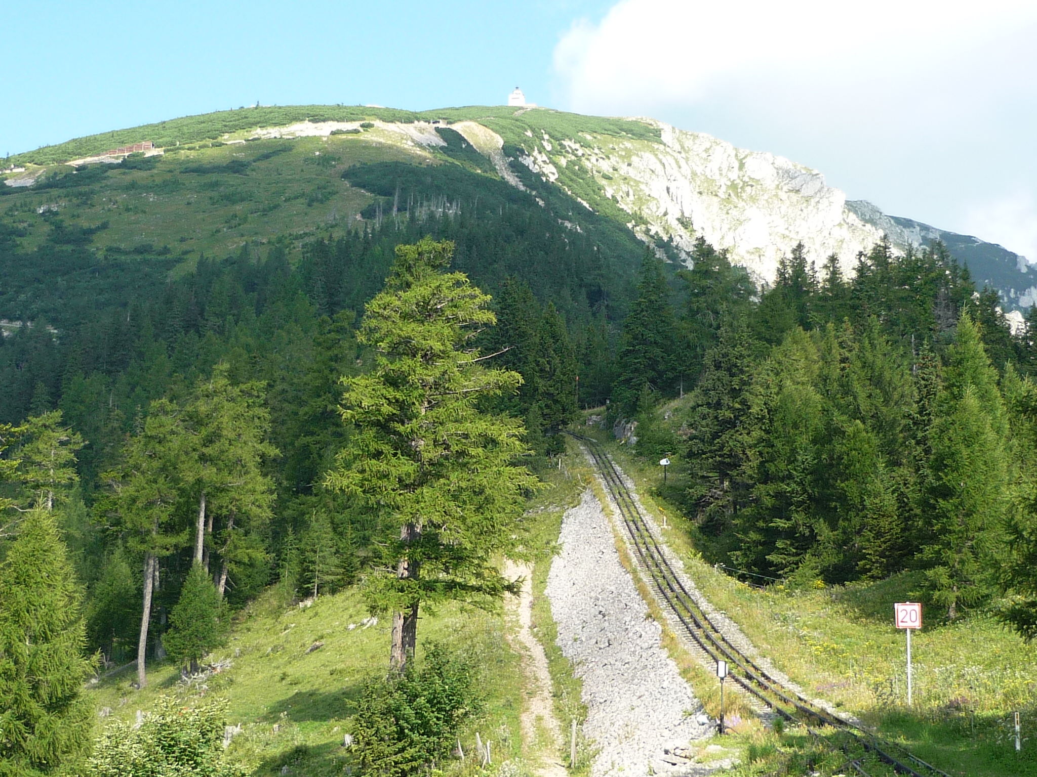 Der schönste Blick auf das Schneebegmassiv von der Station Baumgartner.